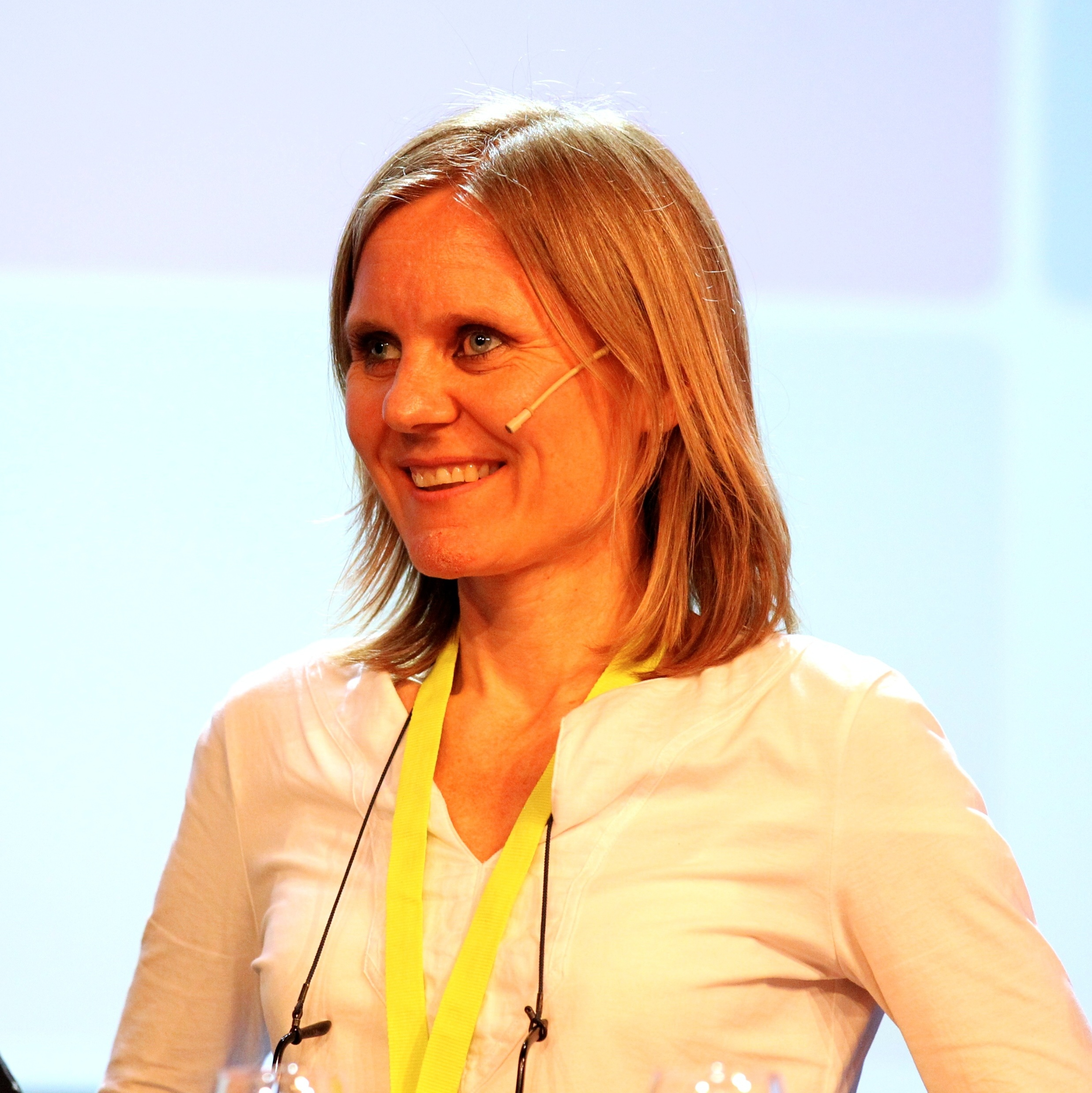 Medvirkende: Per Arne Kalbakk (NRK), Helje Solberg (VG), Magne Storedal (Romerikes Blad), Jan Ove Årsæther (TV 2) Moderator: Svein Tore Bergestuen.